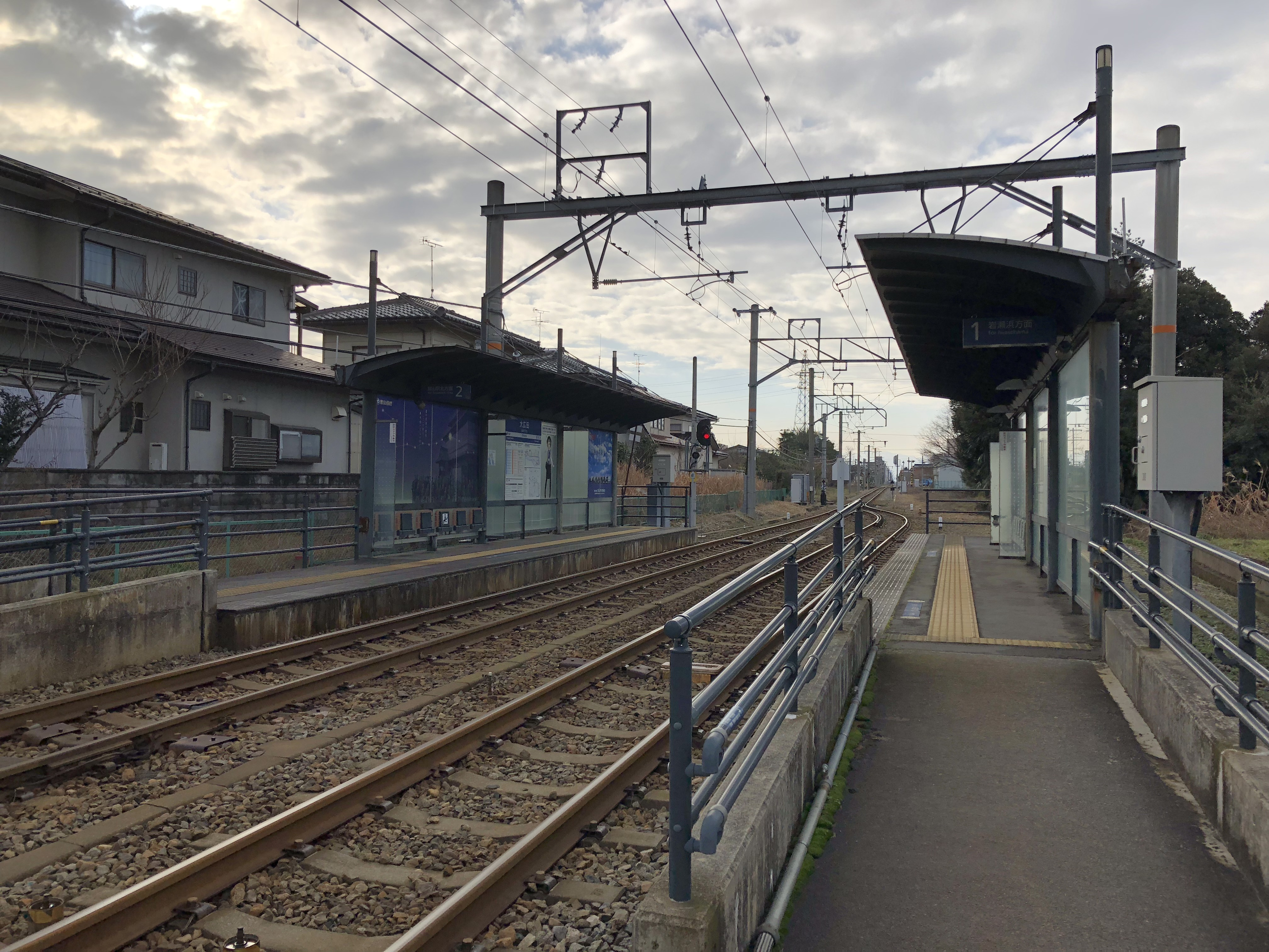 富山ライトレール富山港線大広田駅